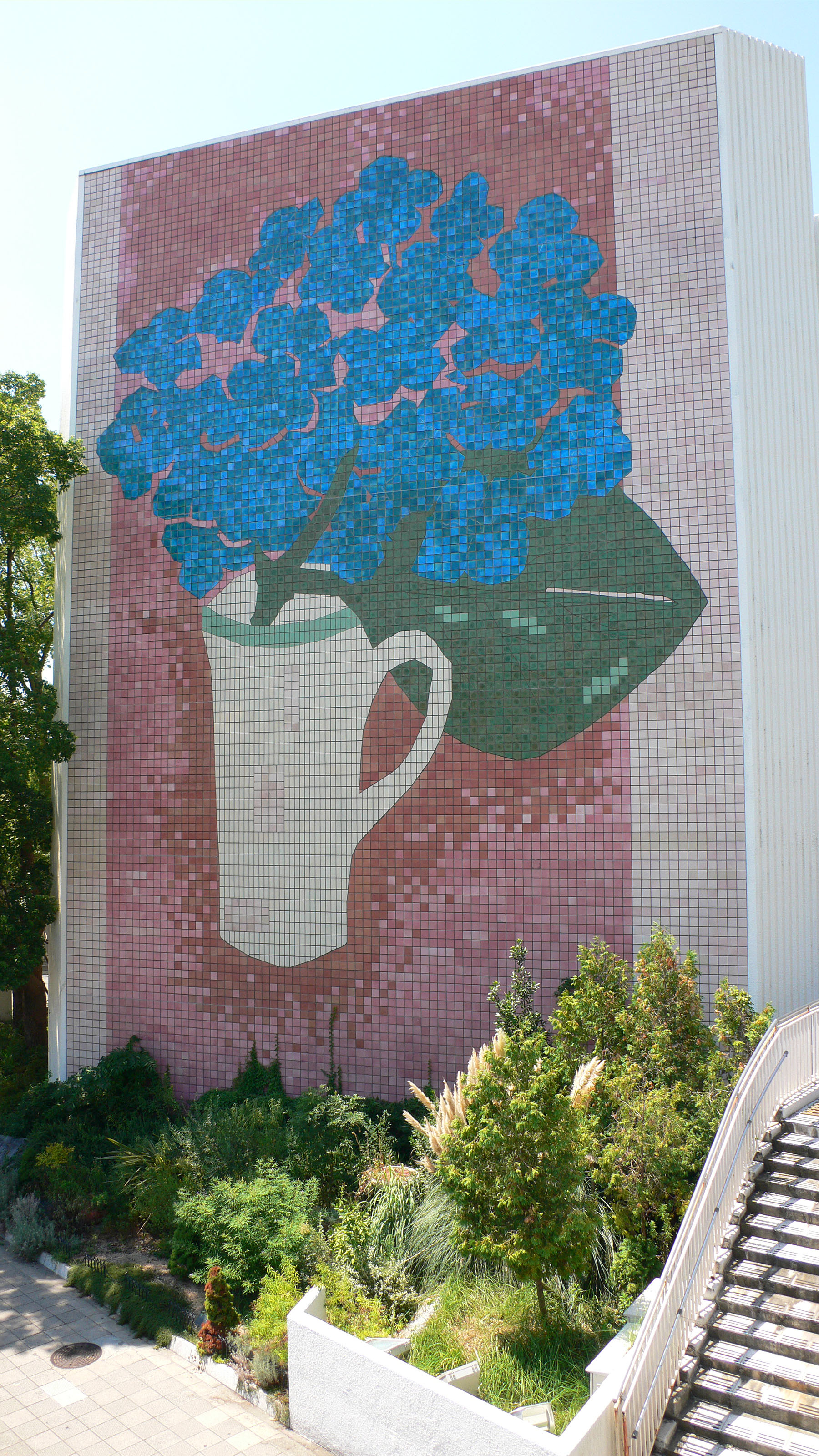 Kobe Bunka Hall in Kobe, Hyogo, Japan